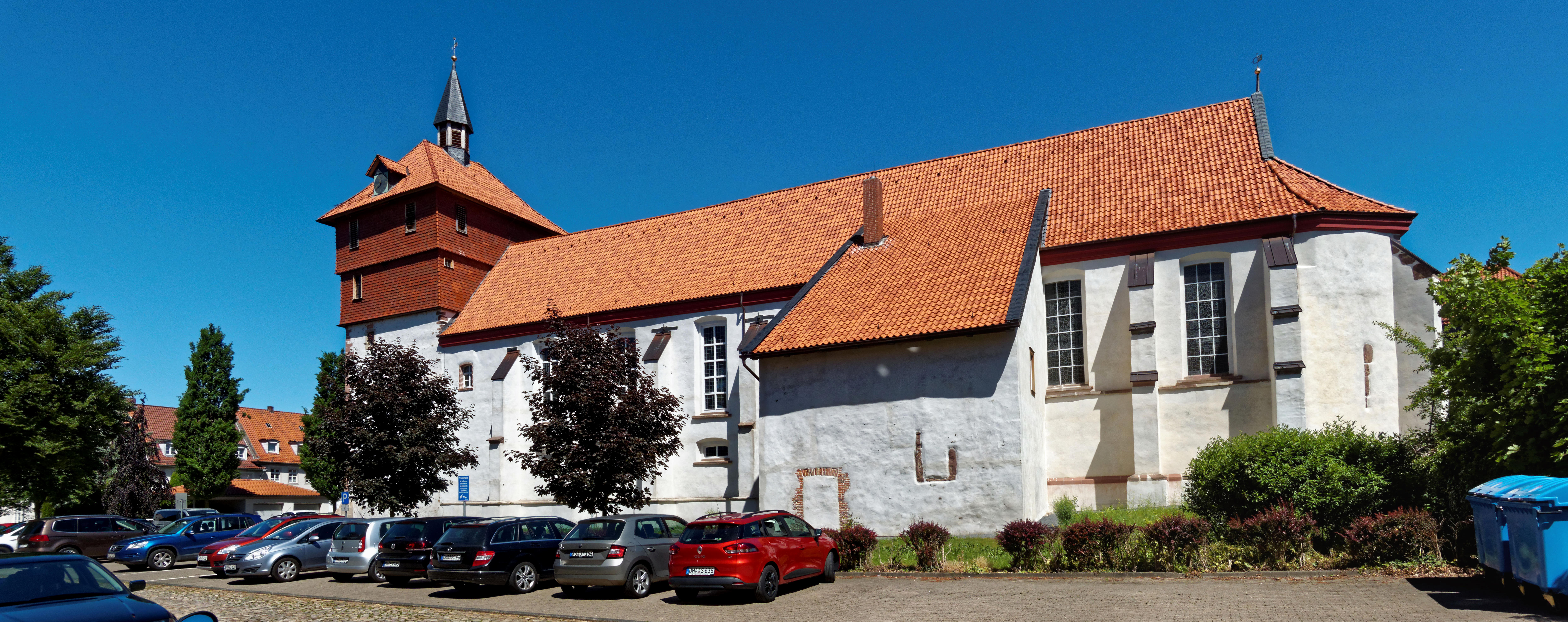 Kirche St. Jacobi in Osterode am Harz nach der Renovierung